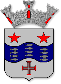 Brasão da cidade de Arujá, São Paulo